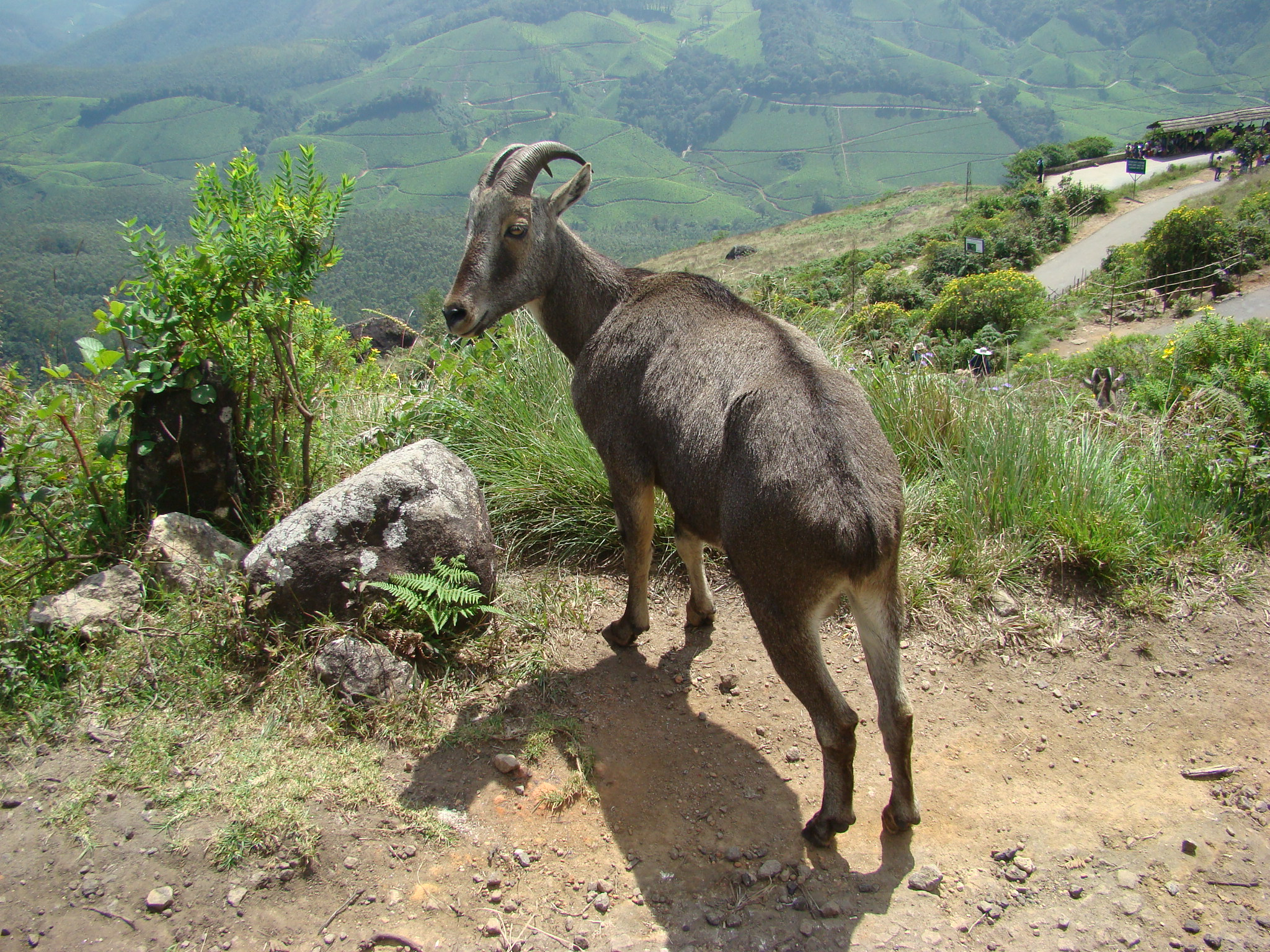 A Nilgiri Tahr near Rajamala, Munnar, Kerala